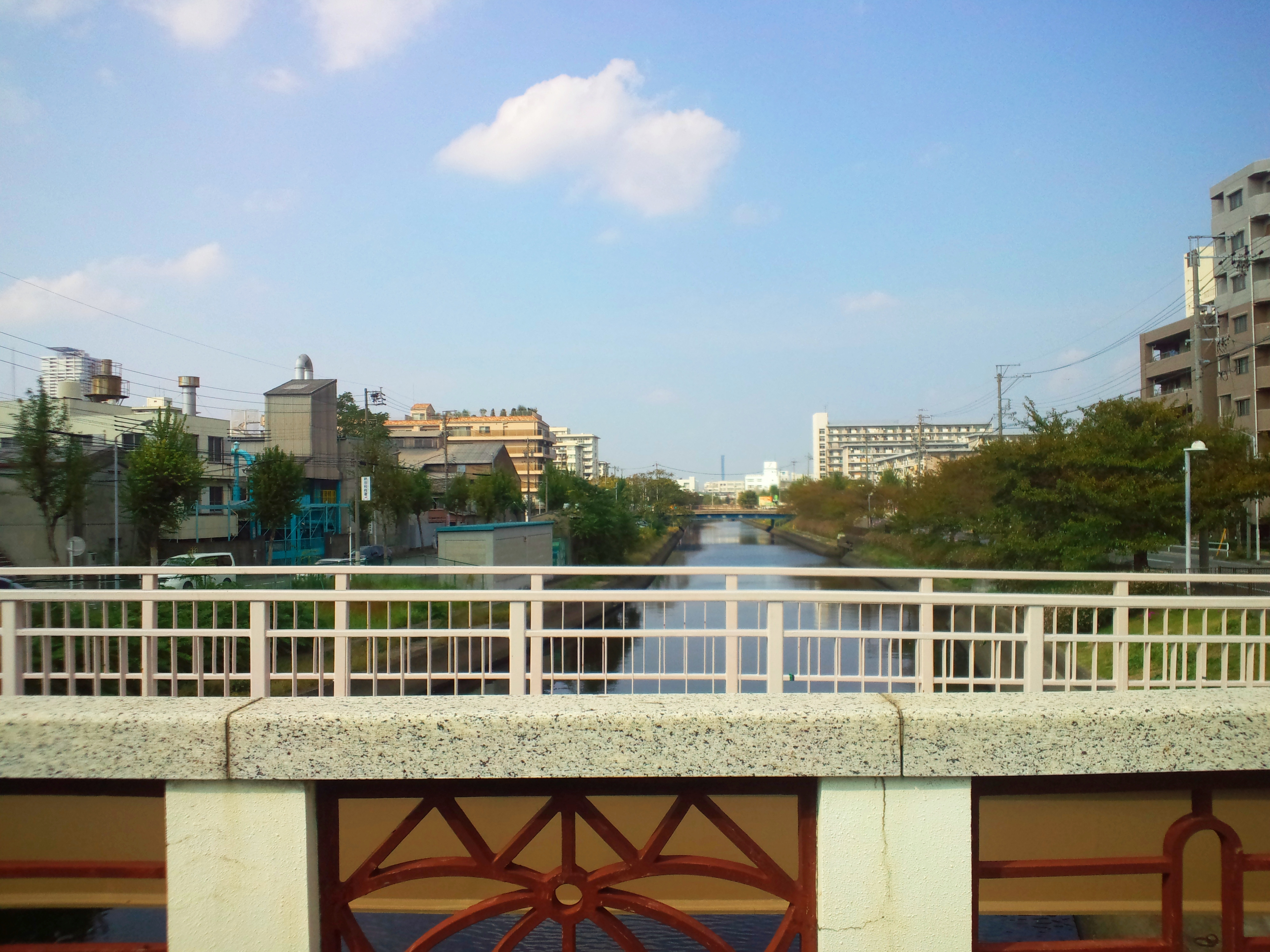 愛知県名古屋市熱田区